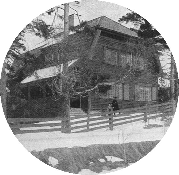 Villa Richard Bergh interiör 1906